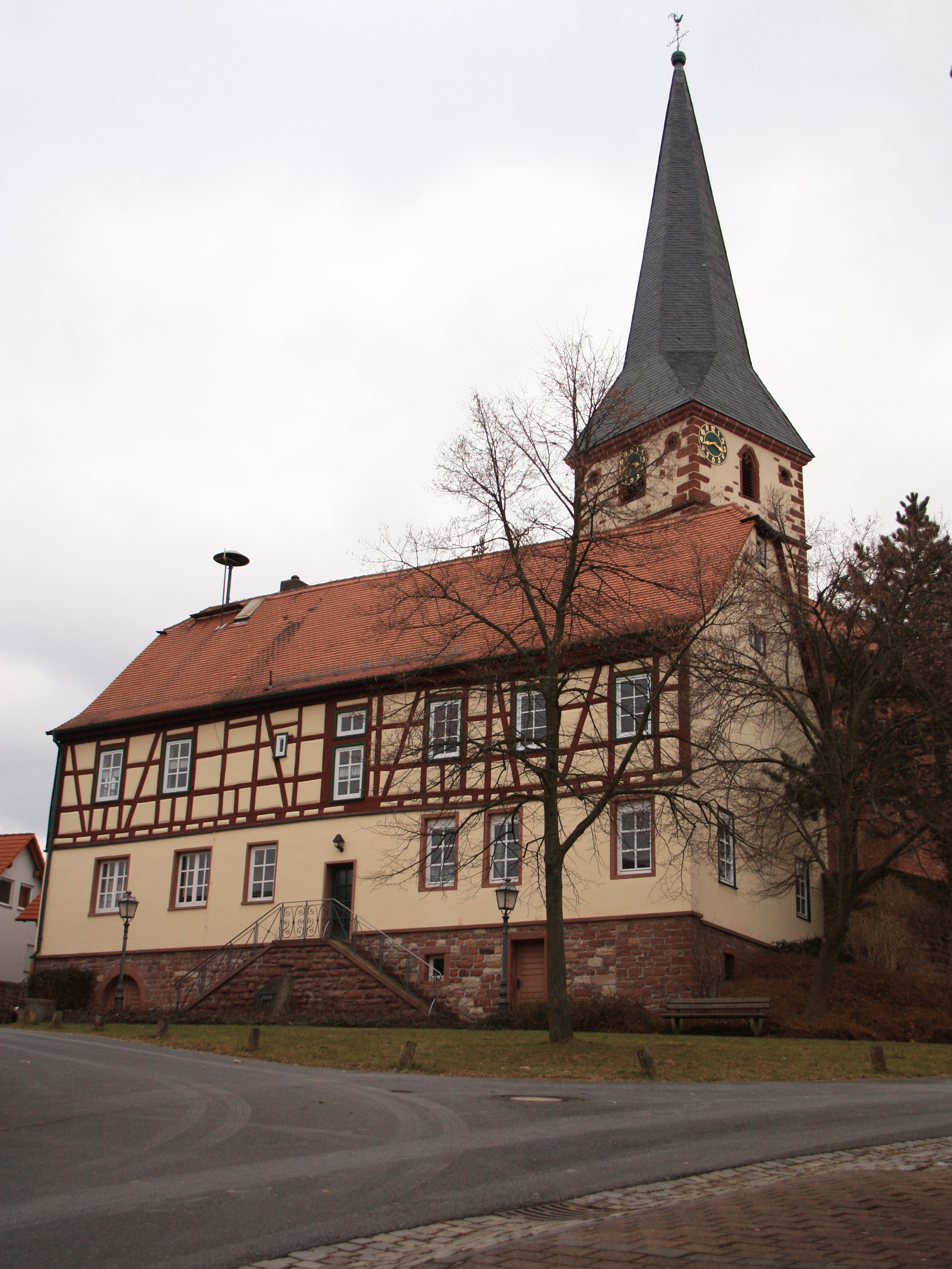 Rathaus und Pfarrkirche in Röllbach